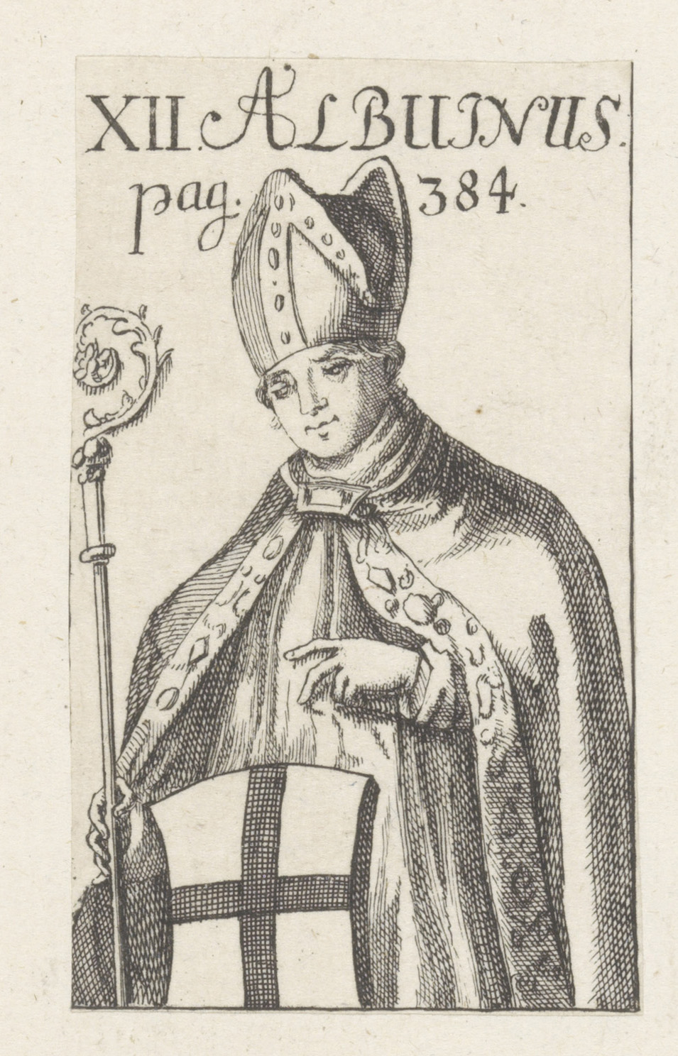 IdentificatieTitel(s): Portret van Albuin, bisschop van MerseburgObjecttype: prent boekillustratie Objectnummer: RP-P-2016-689Omschrijving: Portret van Albuin in een rechthoekige omlijsting. In de bovenmarge zijn naam. Midden boven: pag. 384.VervaardigingVervaardiger: prentmaker: anoniemDatering: 1700 - 1799Fysieke kenmerken: etsMateriaal: papier Techniek: etsenAfmetingen: blad: h 75 mm (binnen plaatrand afgesneden) × b 45 mm (binnen plaatrand afgesneden)OnderwerpWie: AlbuinVerwerving en rechtenVerwerving: onbekend 2016Copyright: Publiek domein